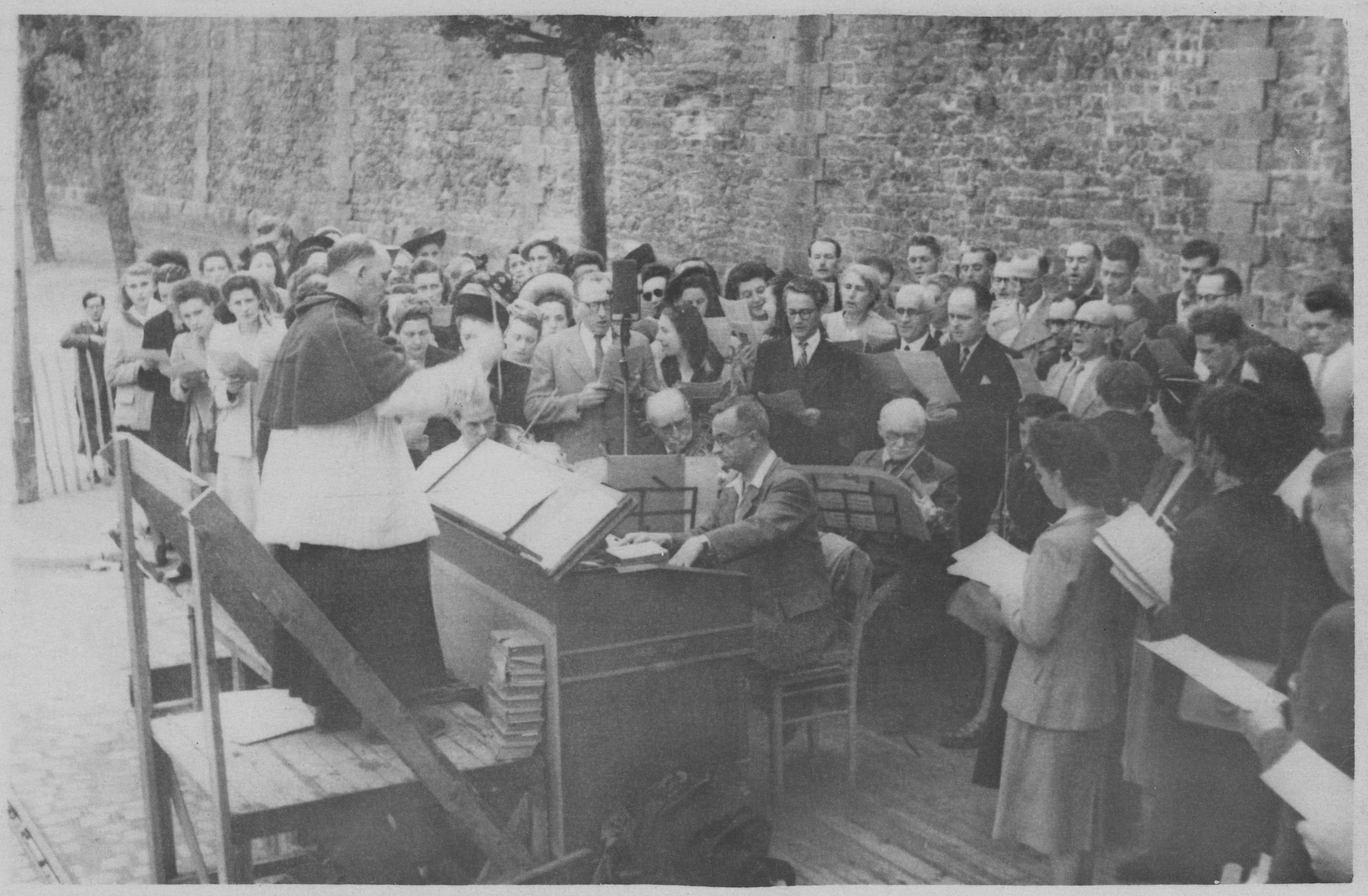 Dori Chauvin à Saint-Malo (Ille-et-Vilaine, France)